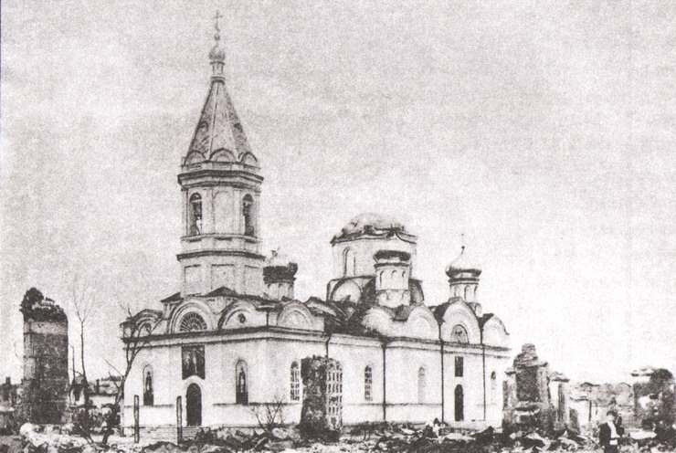 Сызранский Сретенский женский монастырь, Рождественская церковь построена в 1862 году